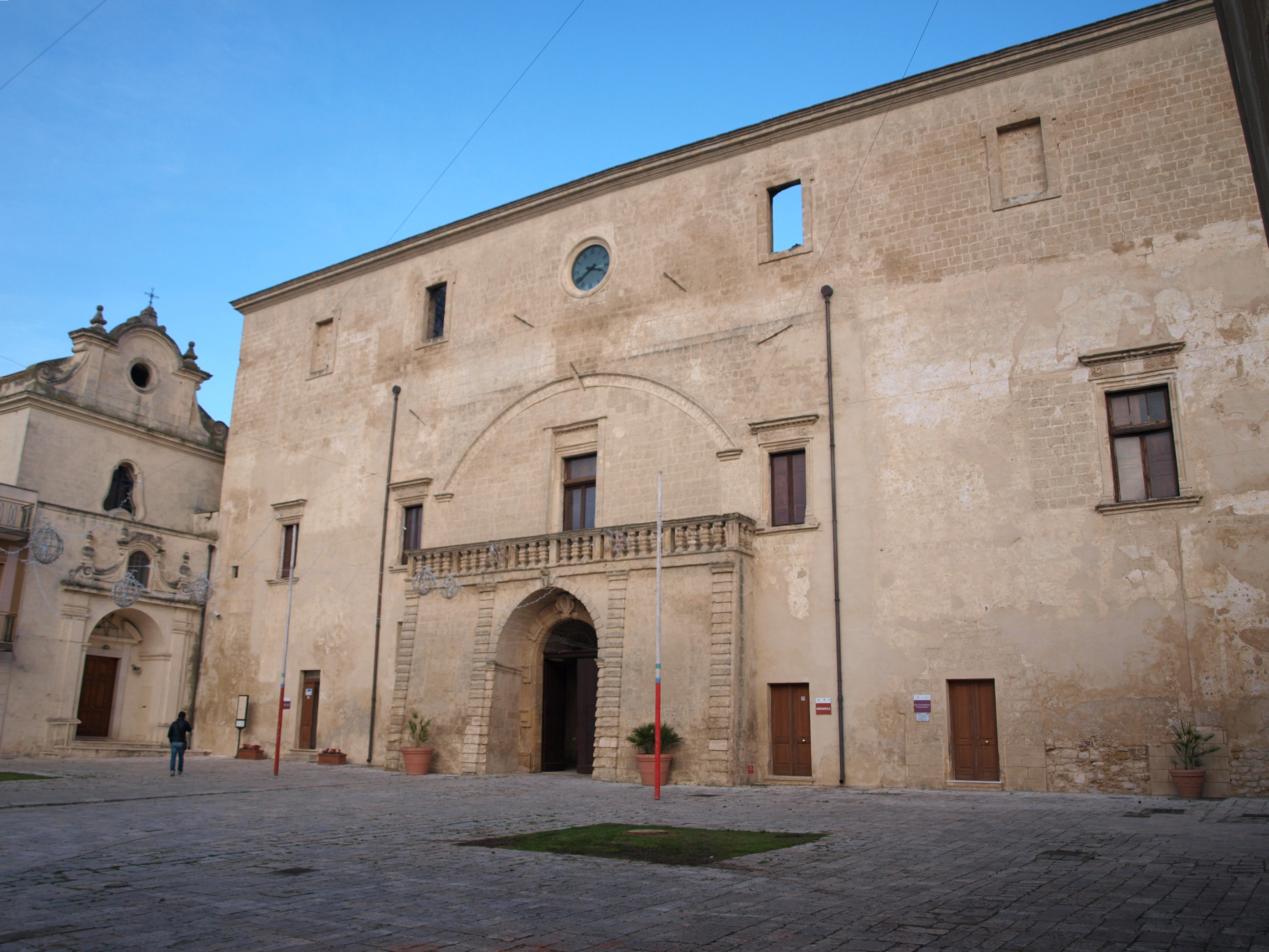 Descrizione = Latiano (BR), Italy: palazzo Imperiali Fonte = opera propria Data = 12/2009 Autore = Pantar Licenza = Pubblico dominio